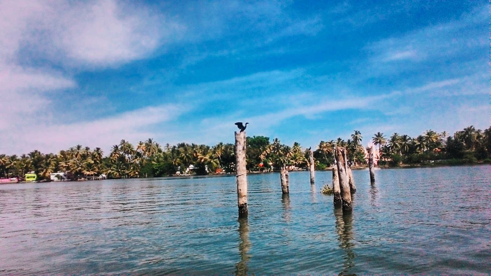 Kayamkulam Kayal